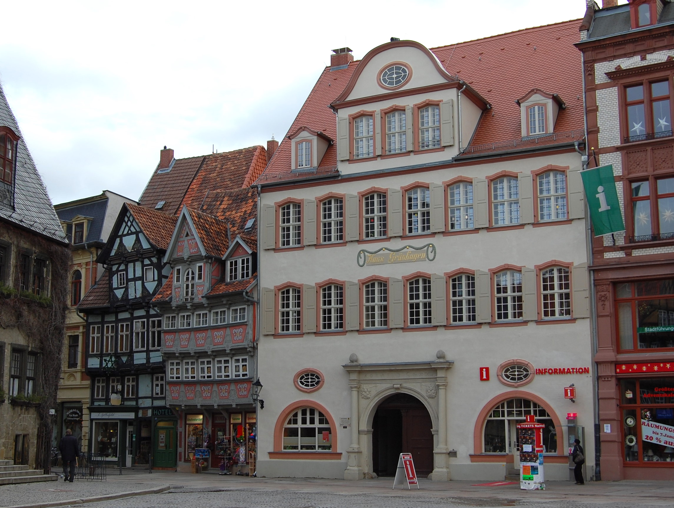 Quedlinburg Marktplatz Haus Grünhagen